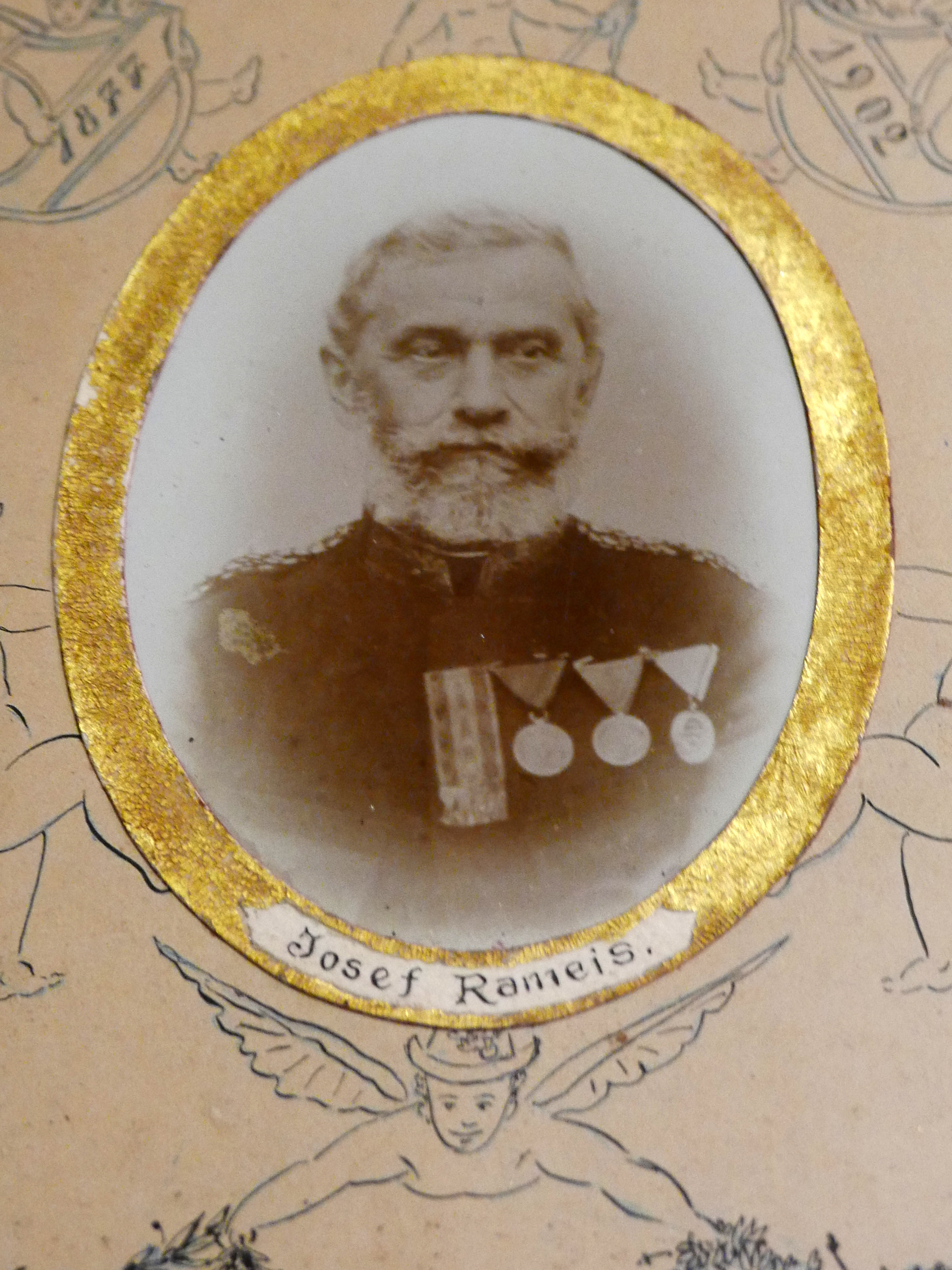 Museum in der Wegscheid : Josef Rameis